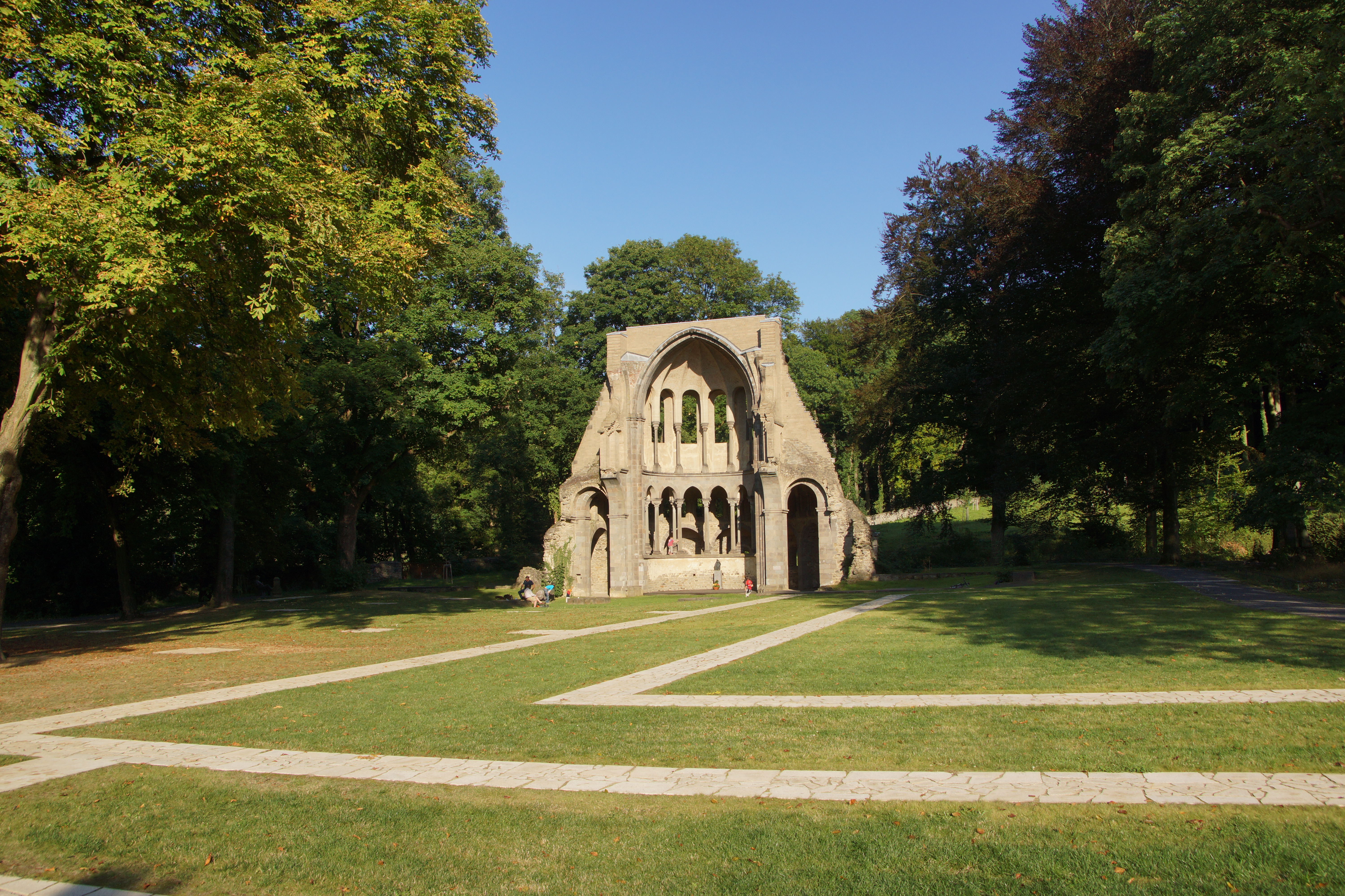 Chorruine Kloster Heisterbach in Königswinter